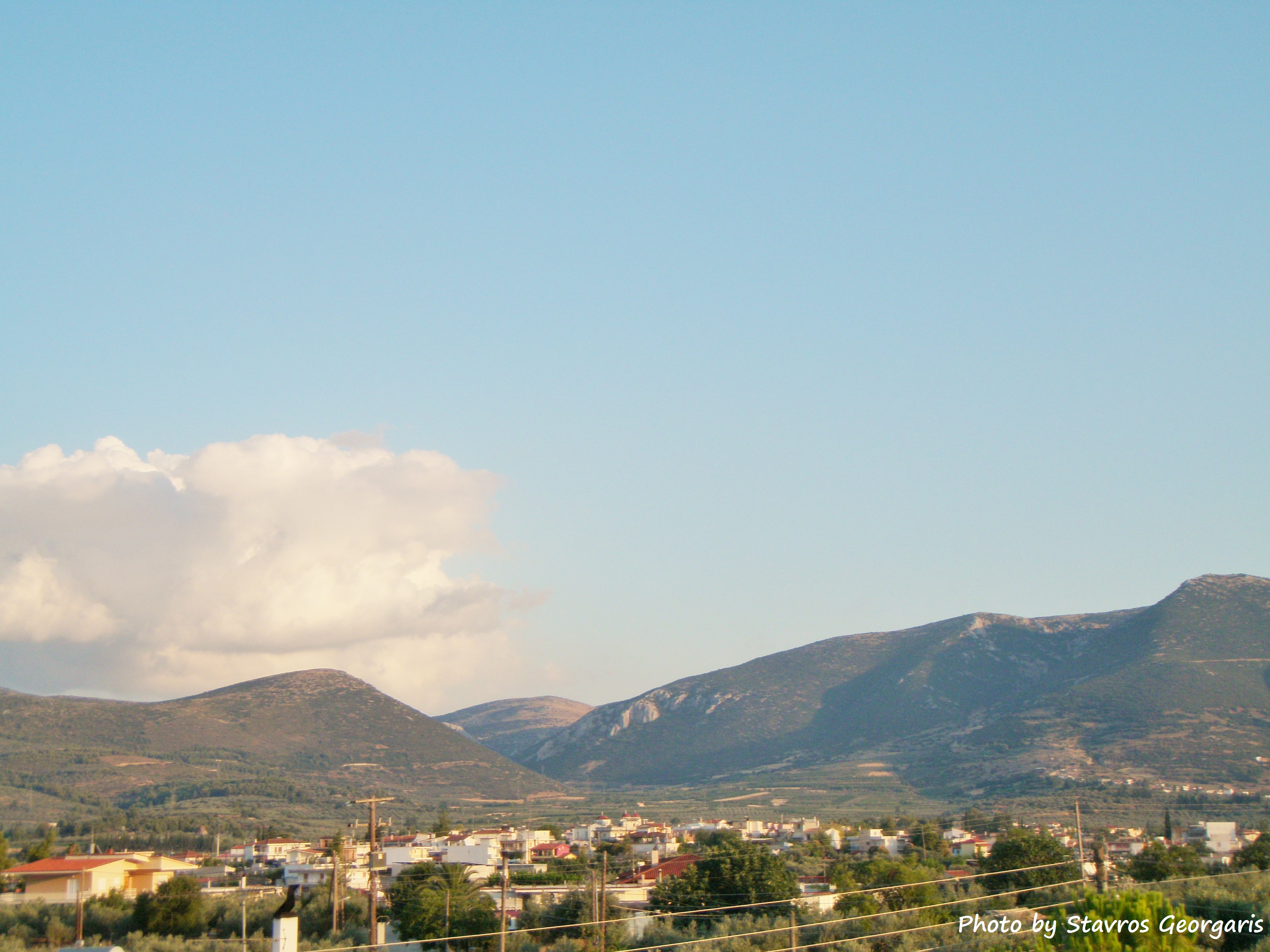 Άποψη του Χιλιομοδίου από την ΒΔ πλευρά του